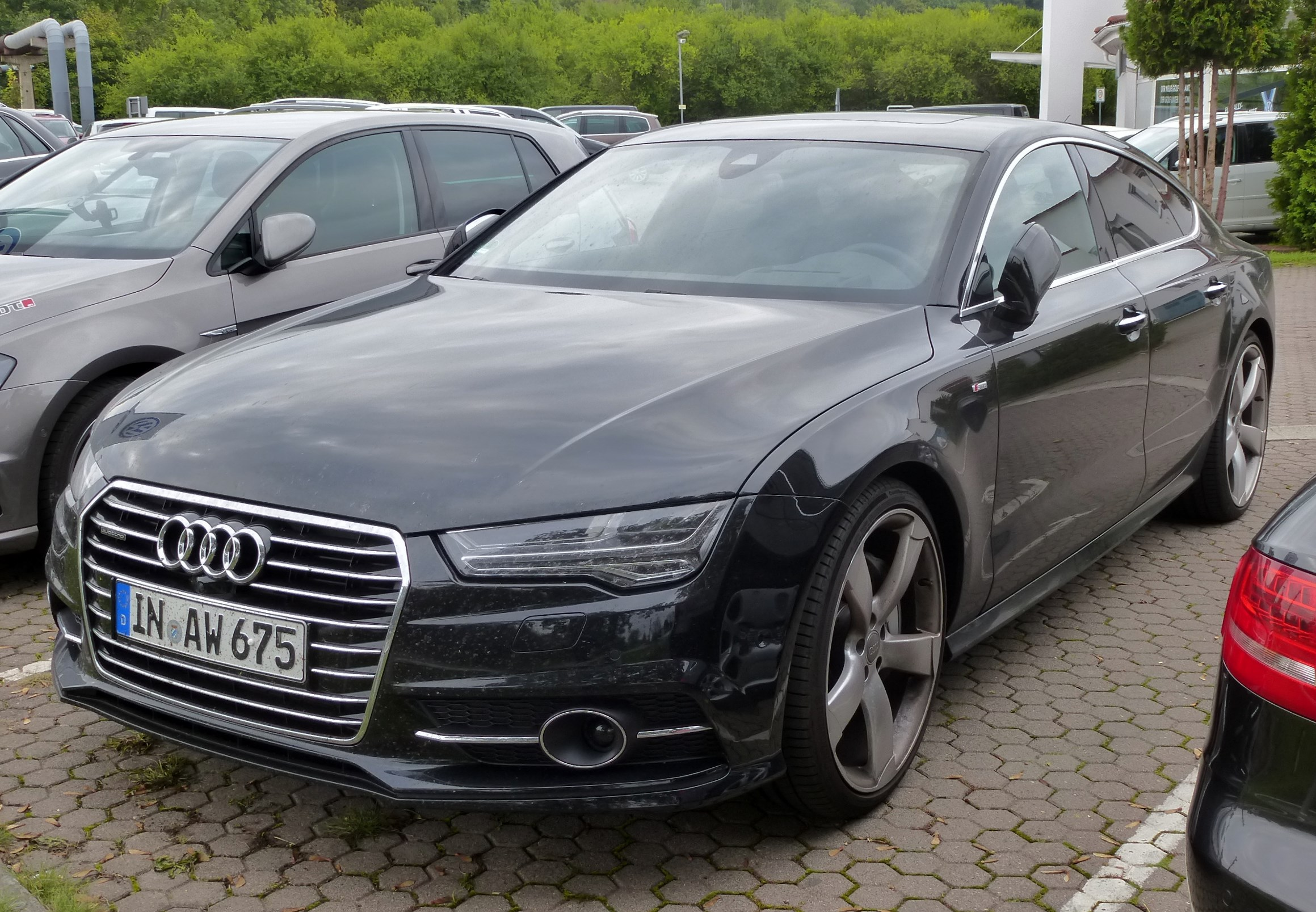 Audi A7 Facelift